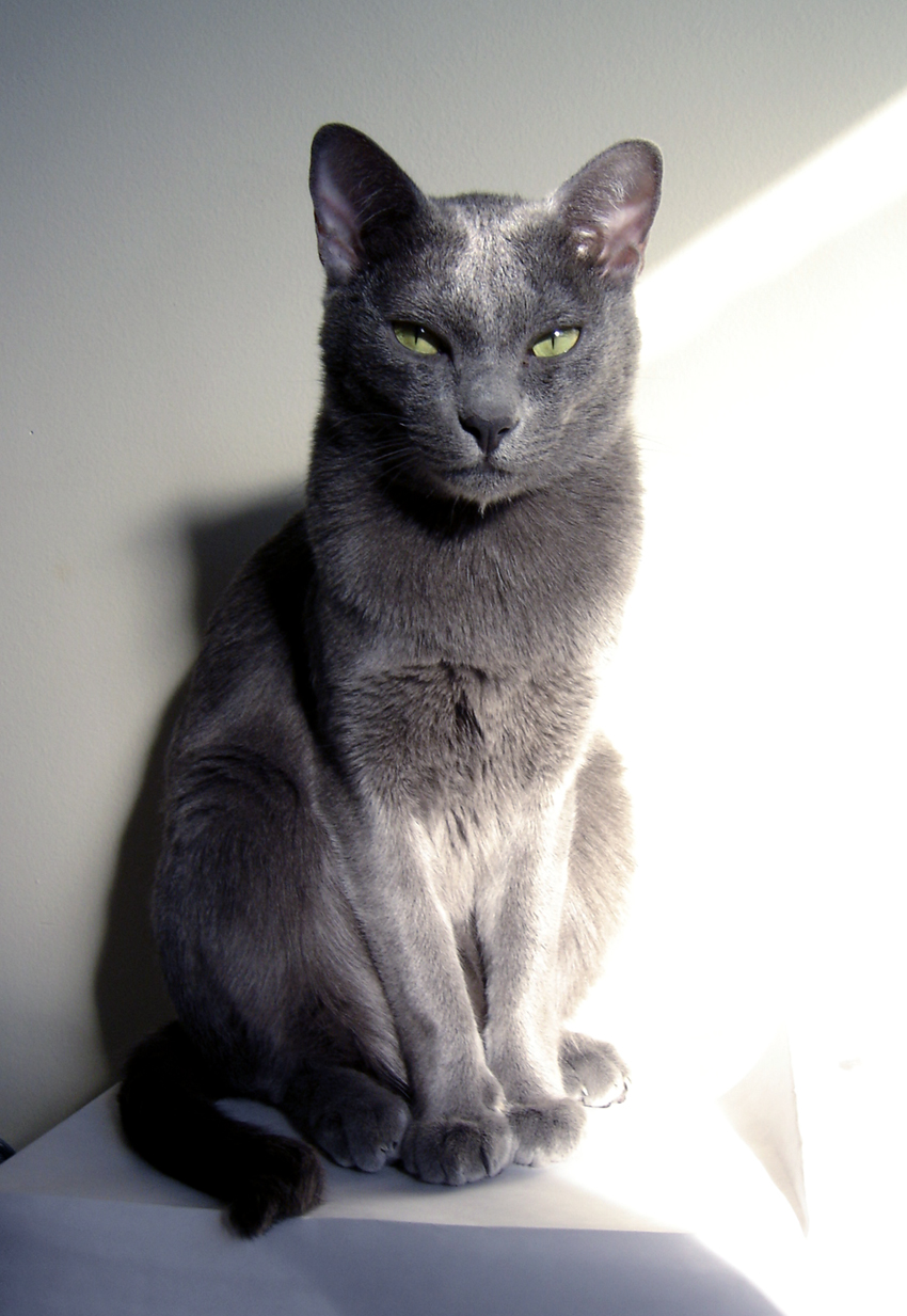 Mâle Korat âgé de 2 ans.